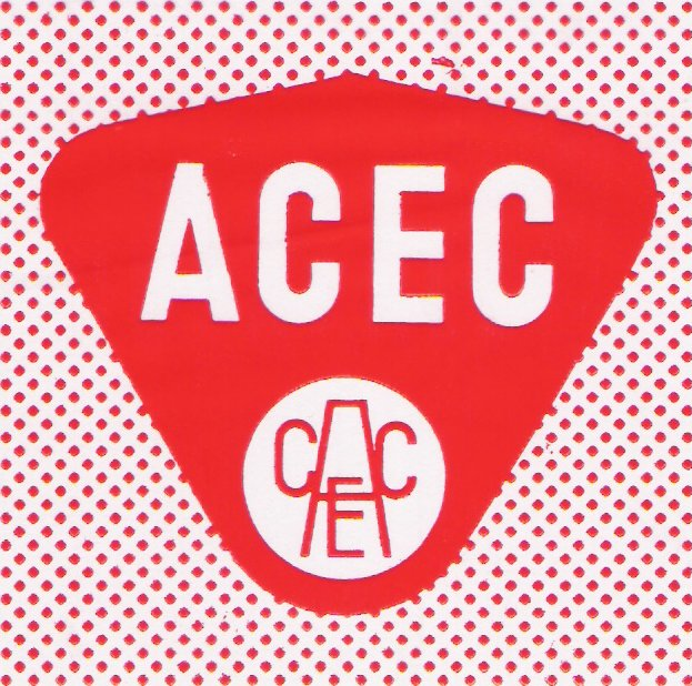 Logo venant des sacs plastique du Service Technique